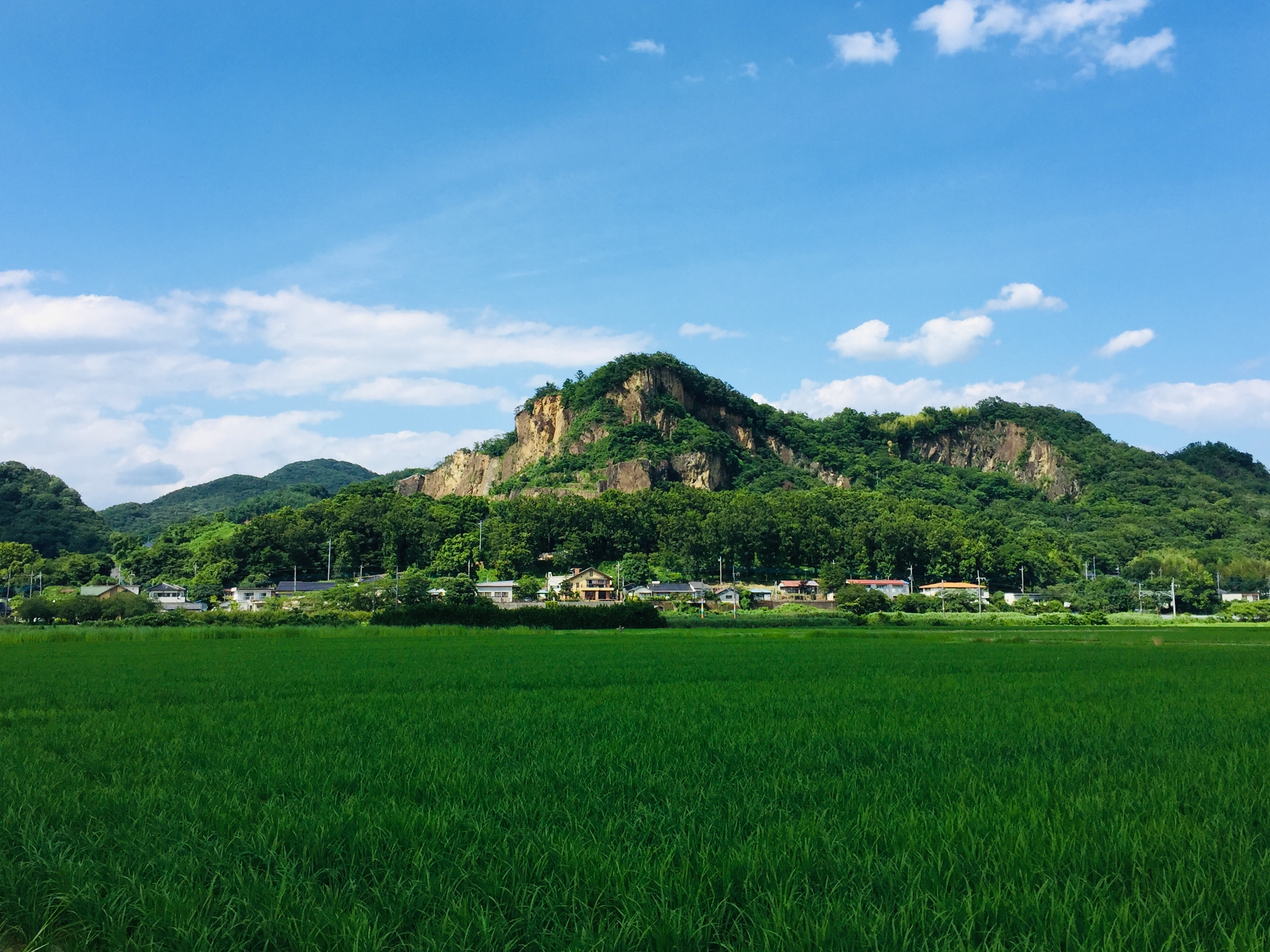 栃木県栃木市岩舟町にある、標高172.7メートルの岩船山。南西から写したもの。